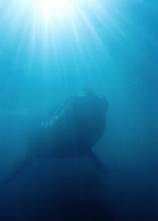 Whale underwater